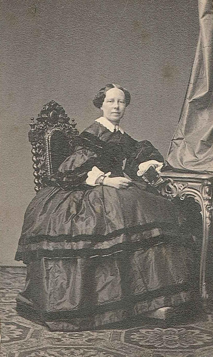 Prinzessin Marie Friederike Charlotte von Württemberg. Grafin von Neipperg. (*30. Oktober 1816-4. Januar 1887*), Tochter der Großfürstin Katharina Pawlowna und König Wilhelms I. von Württemberg. Die Prinzessin heiratete 1840 Graf Alfred von Neipperg. Sie wurde in der Grabkapelle auf dem Württemberg, Stuttgart-Rotenberg, beigesetzt.